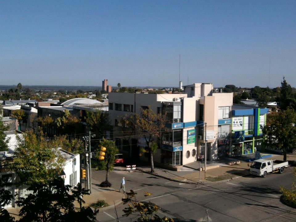 vista ciudad de Paysandú